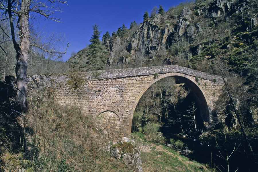 Pont dit de Bounery à Chalencon, commune de Saint-André-de-Chalencon, Haute-Loire, France. Ouvrage à grande arche plein cintre au-dessus de l'Ance dont la petite arche déversoir de crue a été aveuglée. .